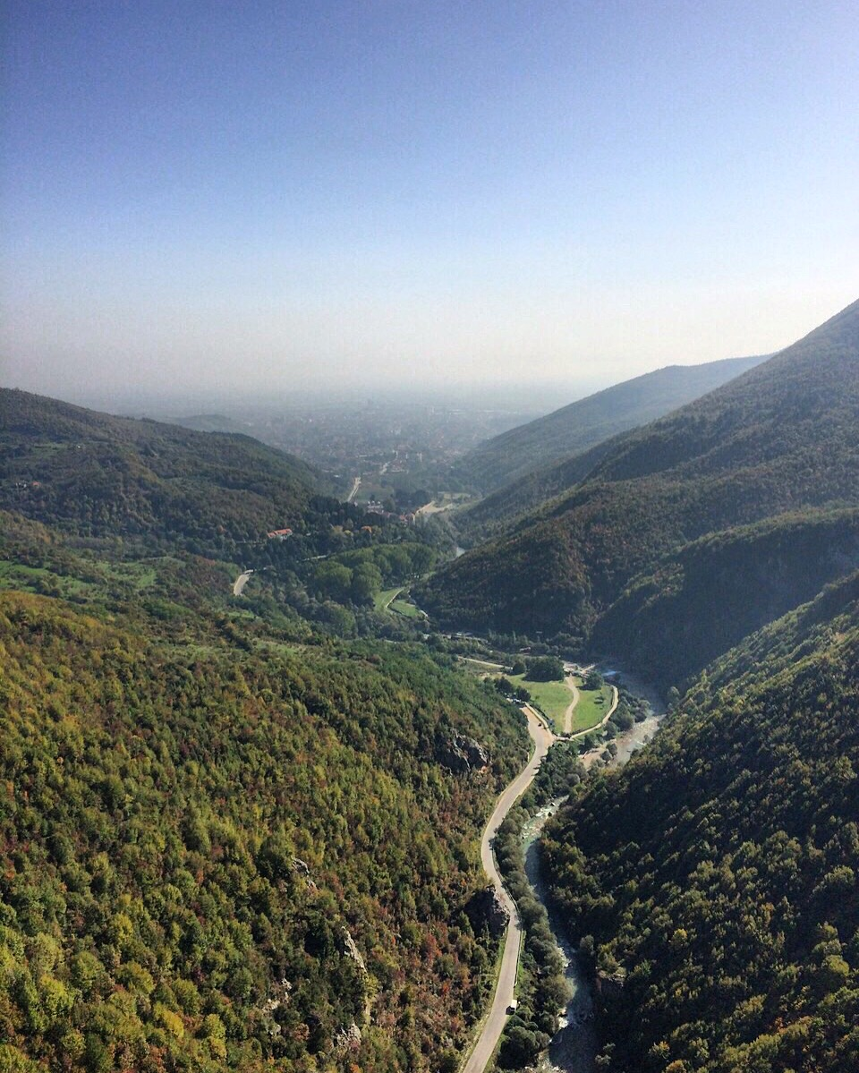 Parku Kombëtar Bjeshkët e Nemuna, Pejë